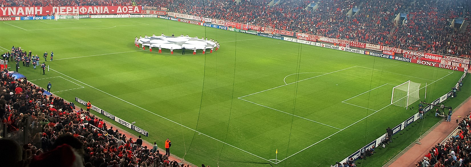 Karaiskakis Stadium Piraeus before Olympiacos-Arsenal